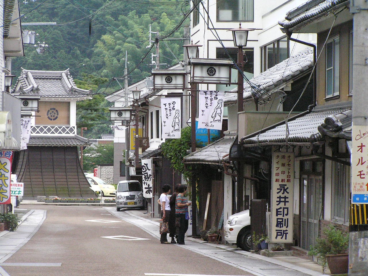 柏原駅前通り